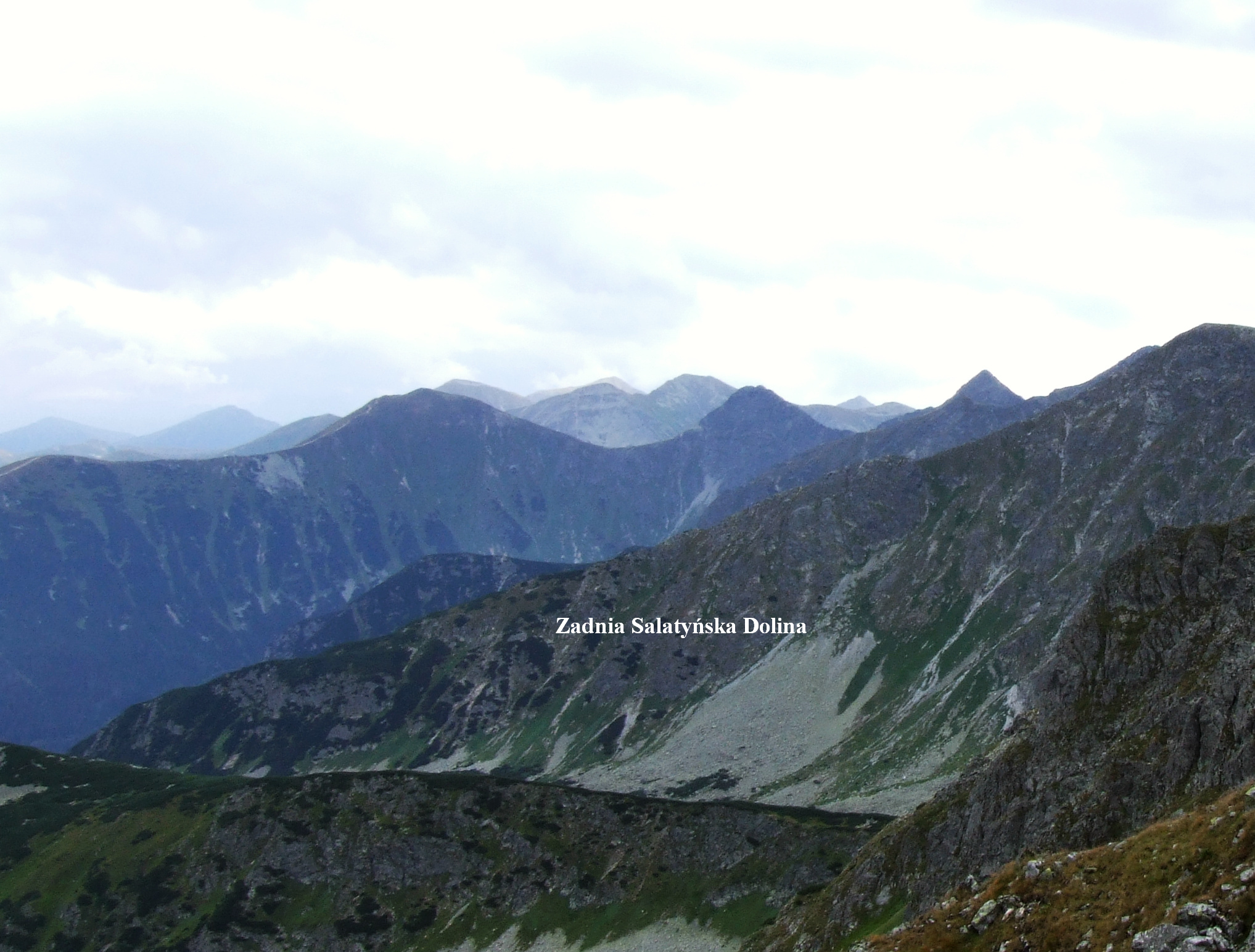 zadnia Salatyńska Dolina (West Tatra Mountains). U góry:wołowiec, Rohaczze, Spalona